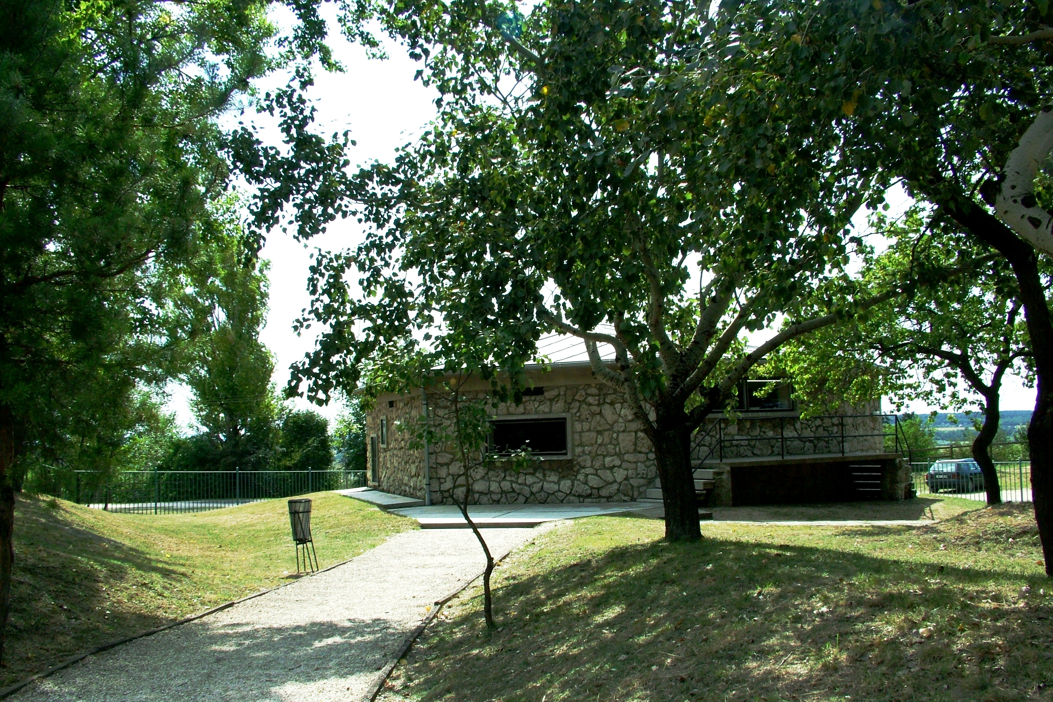 Kiállító pavilon (Vértesszőlős Őstelep)